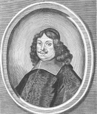 Kardynał Fryderyk Hessen-Darmstadt